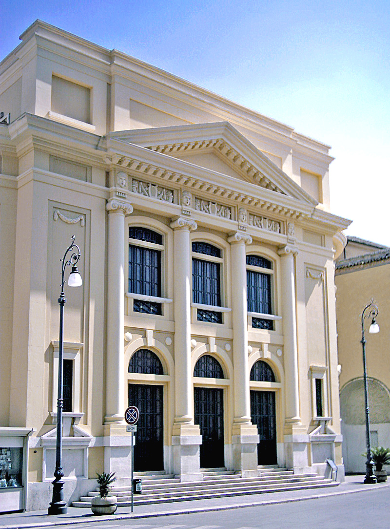 San Severo, facciata del Teatro Comunale "Giuseppe Verdi" (1937) File creato da Tobia Gorrio. Categoria:San Severo